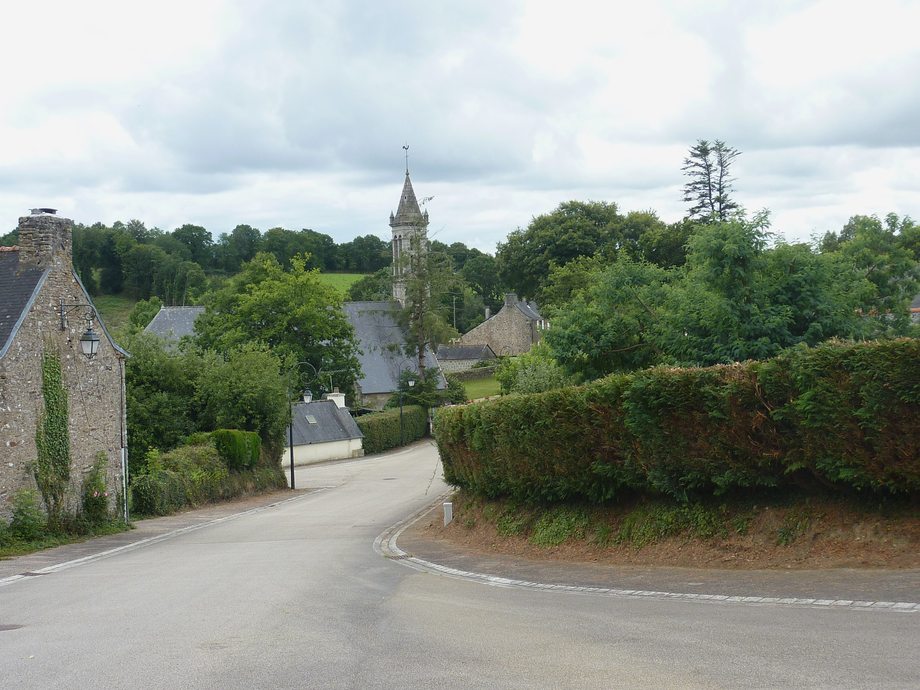 Locmaria-Berrien : le bourg